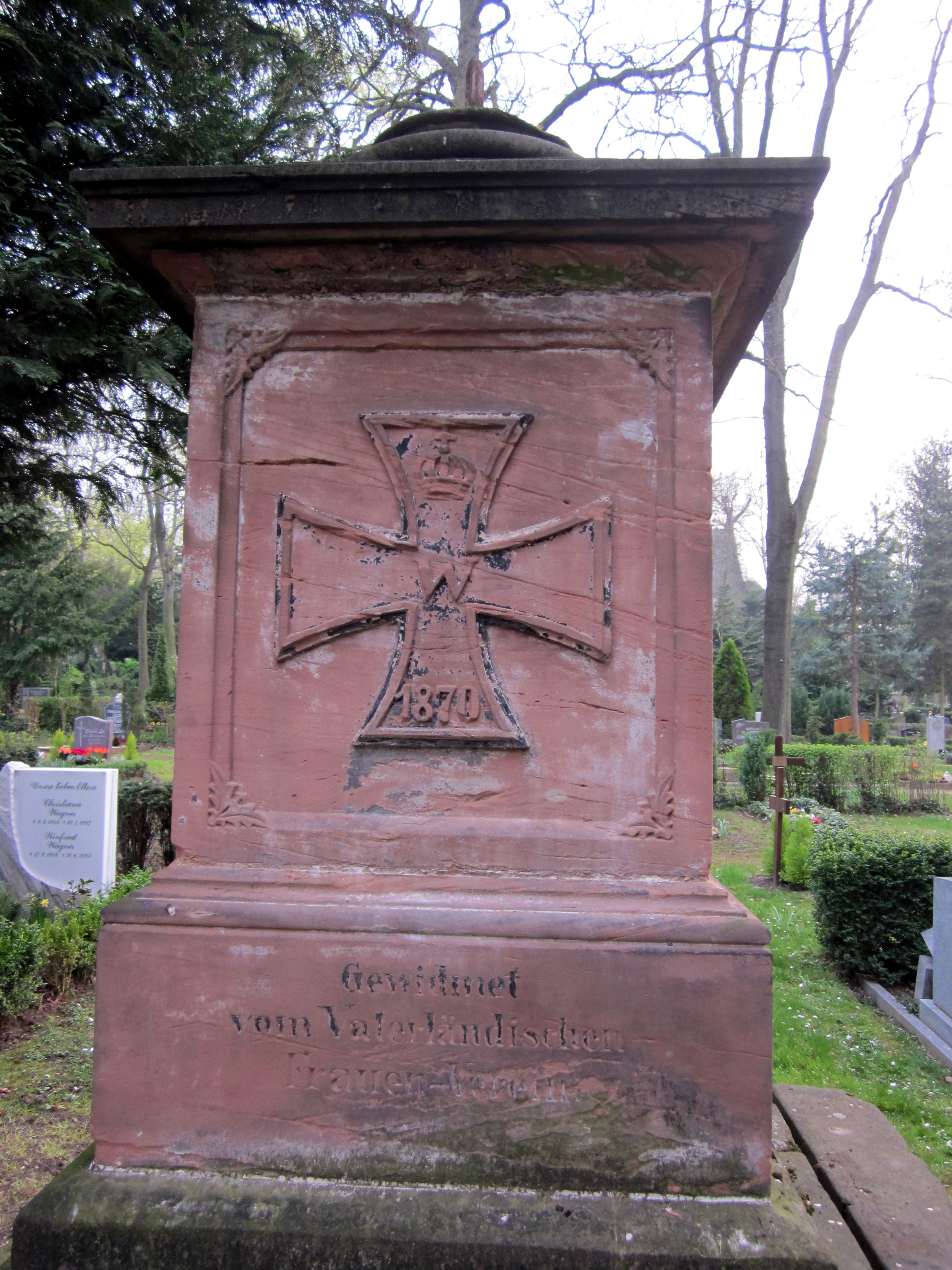 Friedhof Weißenfels: (Sockel des) Denkmal(s) für die Gefallenen des Deutsch-Französischen Krieges 1870/71, gewidmet vom Vaterländischen Frauenverein